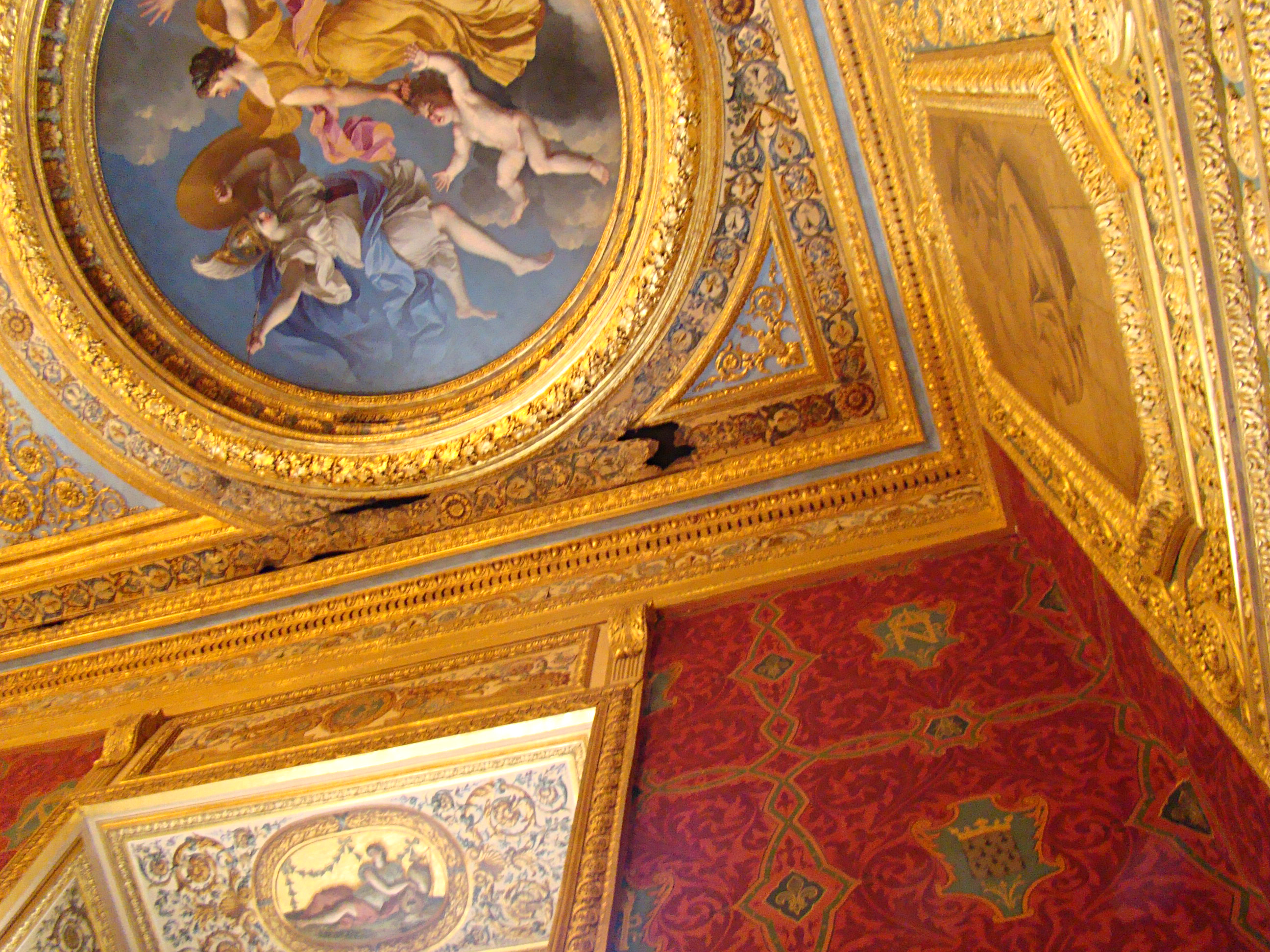 La Grand'Chambre du parlement de Bretagne. Détail sur une trace laissée par l'incendie de 1994.